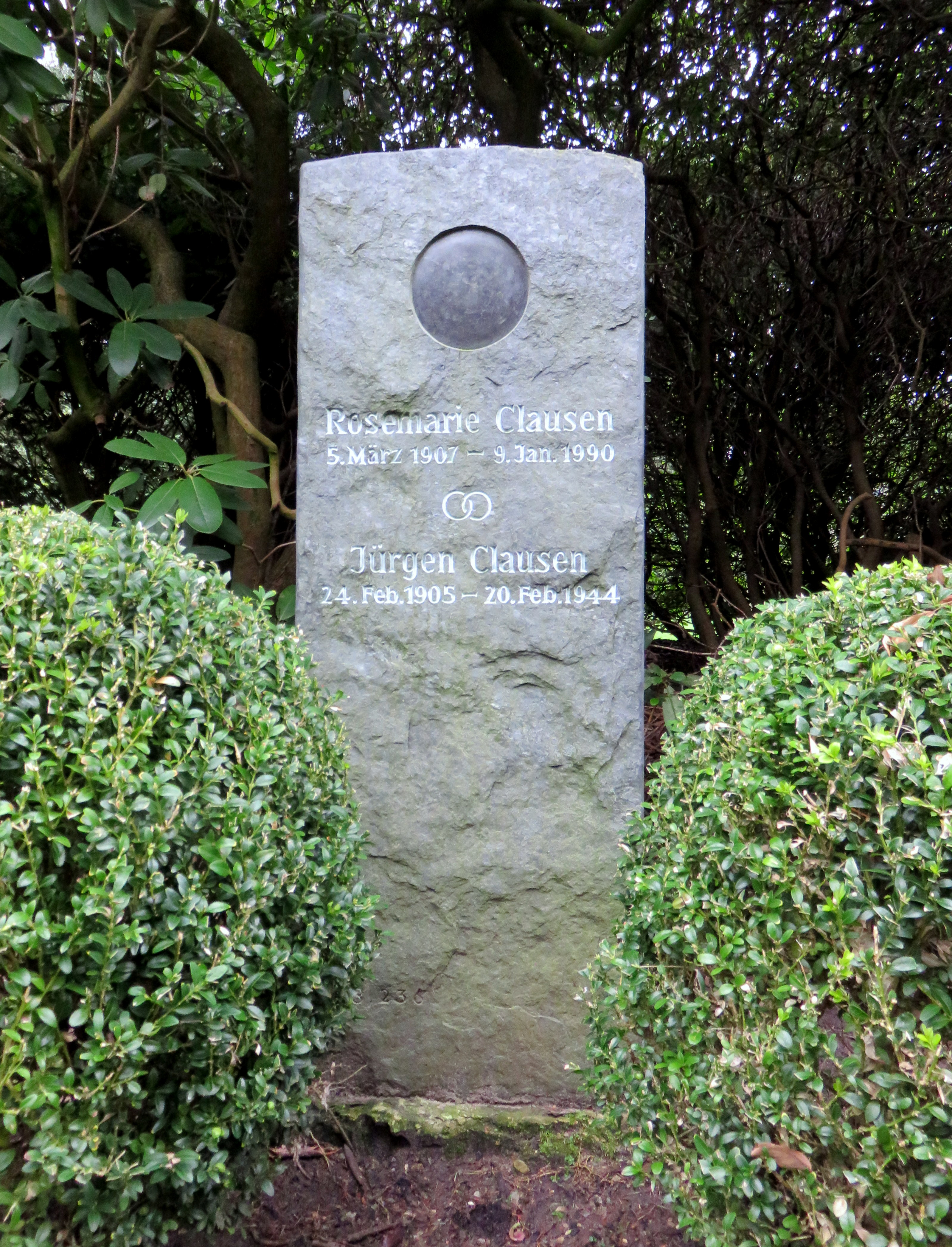 Grabstätte der deutschen Fotografin Rosemarie Clausen, Friedhof Ohlsdorf, Planquadrat O8, 236 (oberhalb Cordesallee).